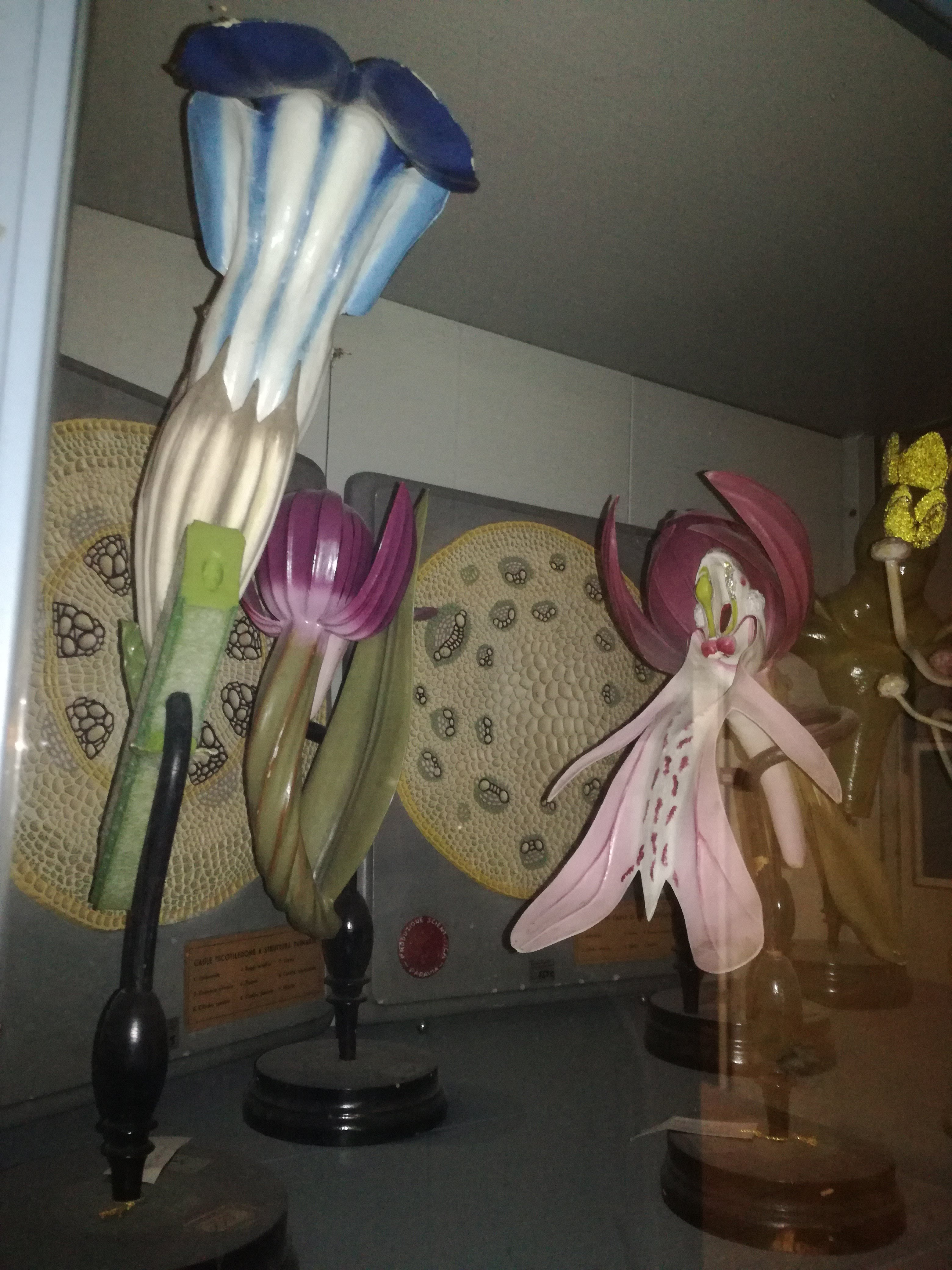 Modelli botanici della manifattura Brendel conservati al liceo ginnasio Dante di Firenze